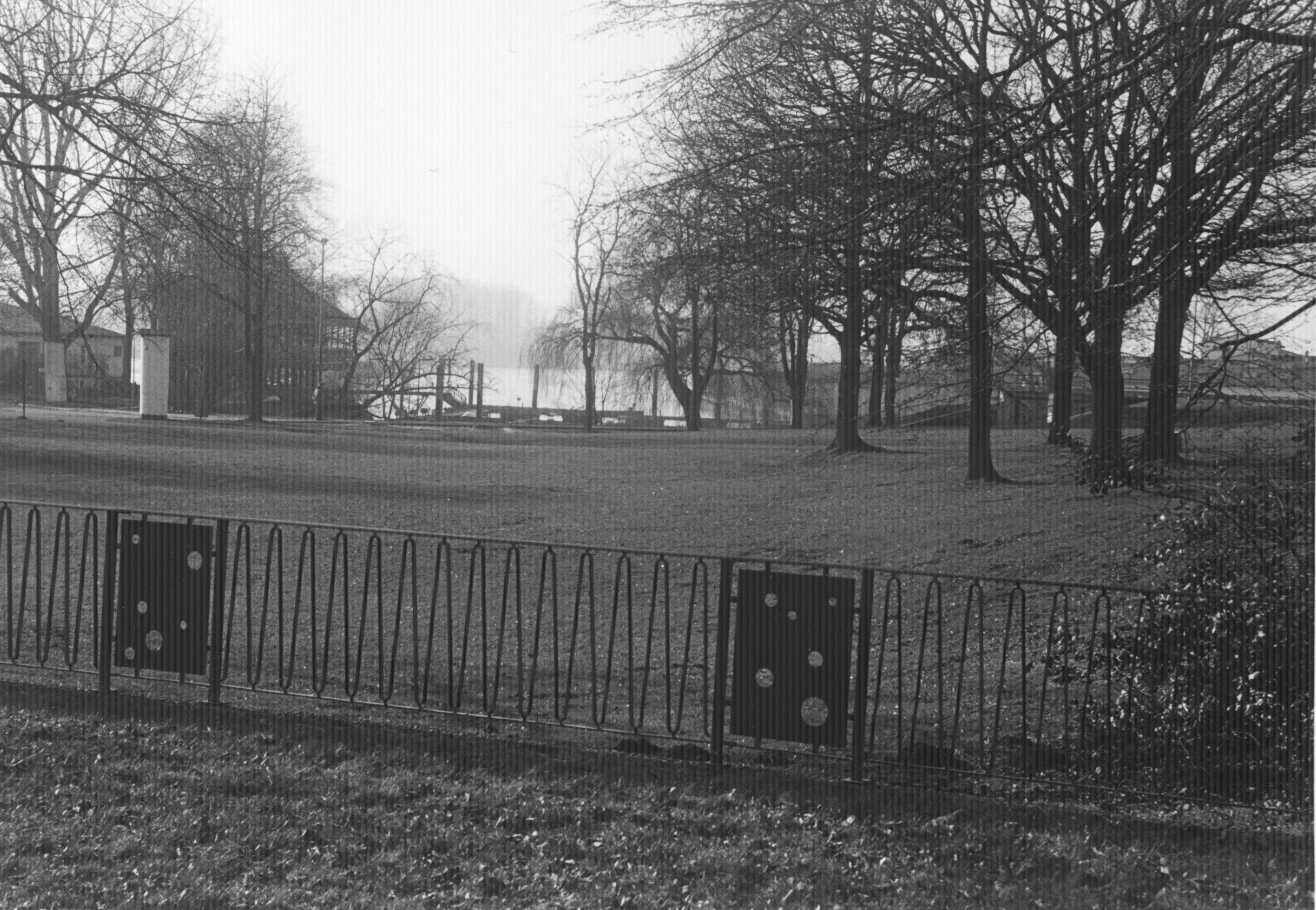 Gelände der Mündung des alten "Donaufleets" an der Fähre Blumenthal